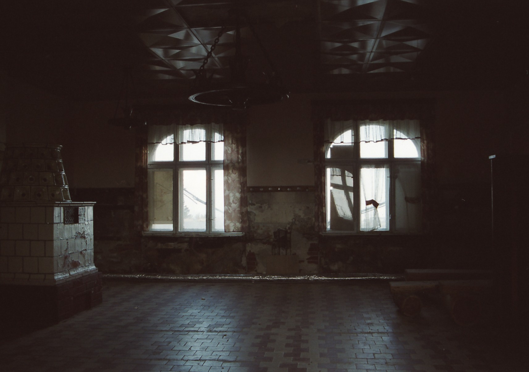 Horský kotel Klínovec, vrchol hory Klínovec, Jáchymov čp. 1016, Jáchymov.